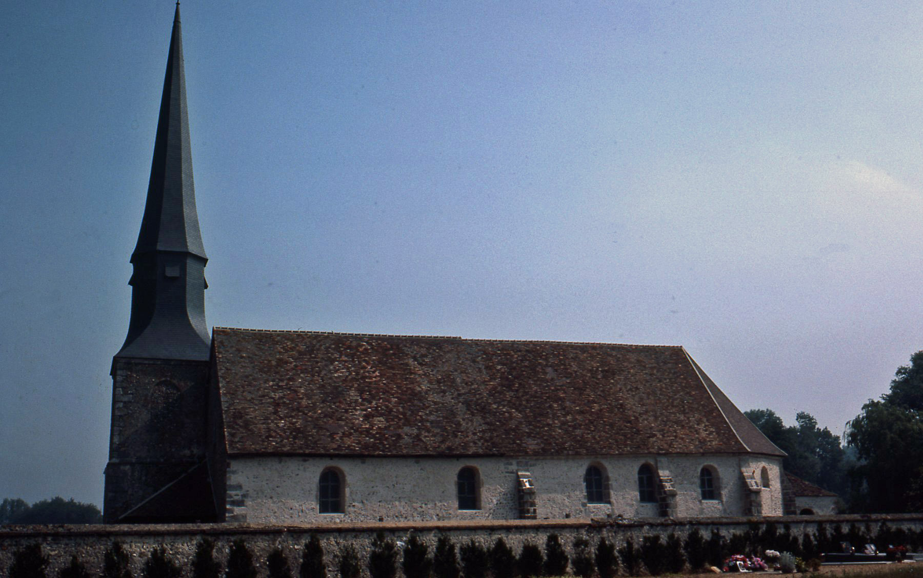 Extérieur